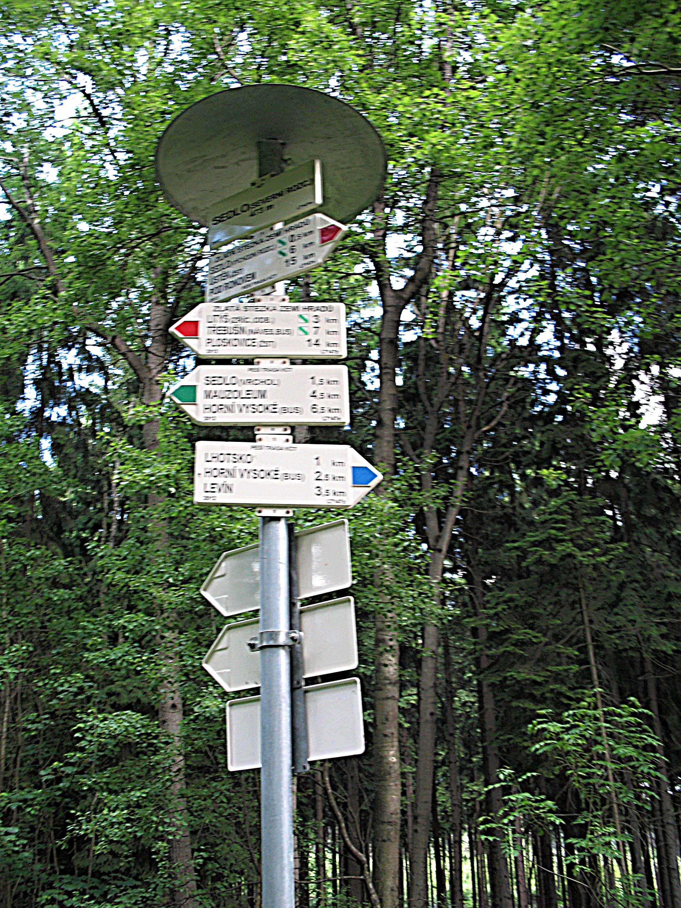 Cesta k vrcholu Sedla v Českém středohoří. Severní rozcestí pod Sedlem